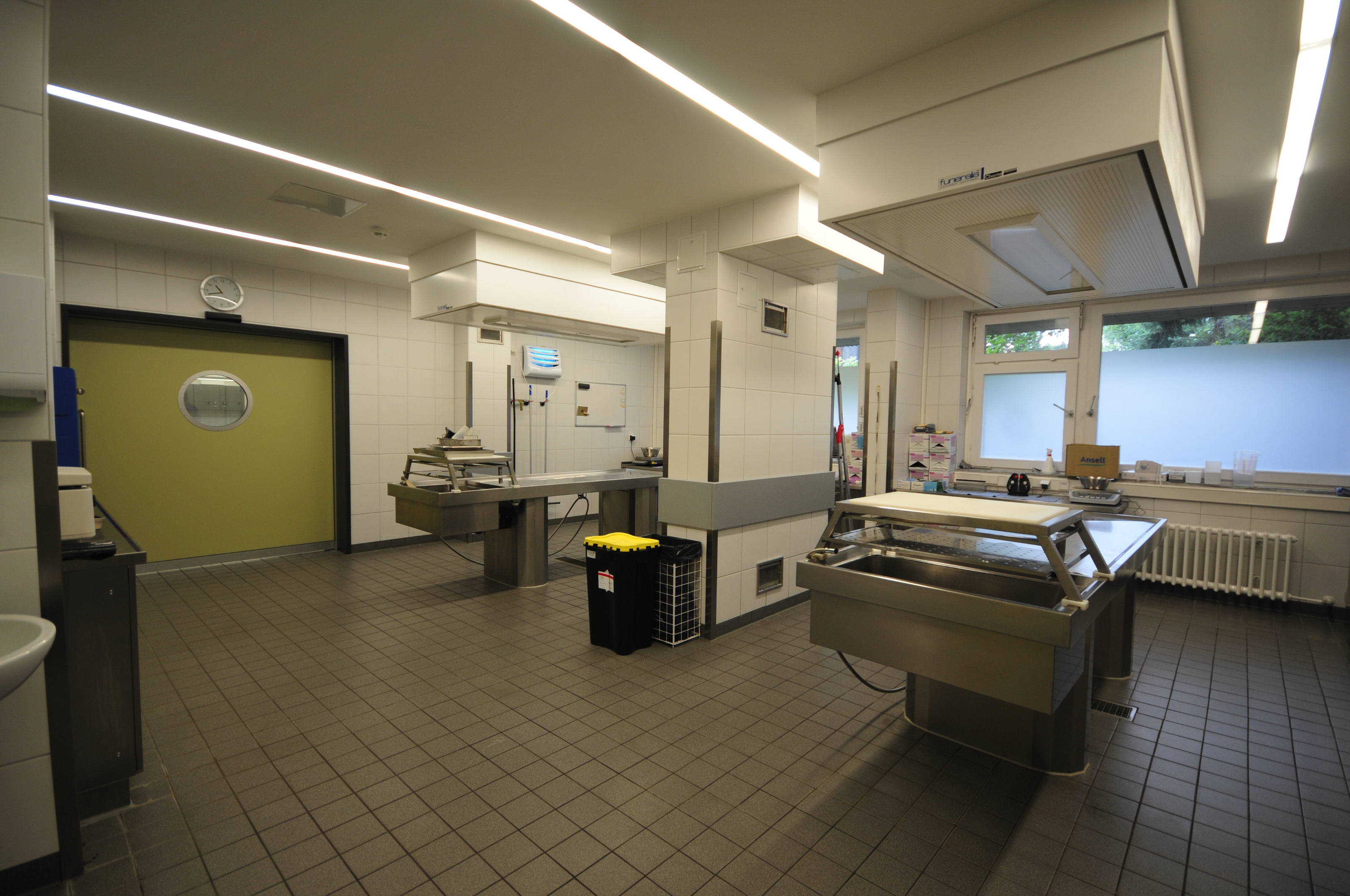 Michael Tsokos Sektionssaal der Charité